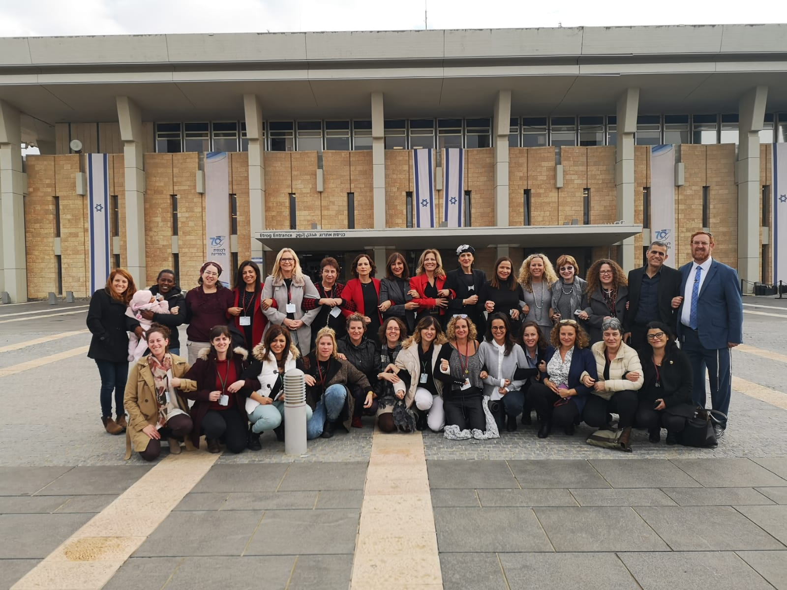 ציון אישור החוק לאיסור צריכת זנות - חברות וחברי הכנסת בתמונה ברחבת הכנסת מיד לאחר האישור עם חברות המטה למאבק בסחר בנשים ובזנות והקואליציה למאבק בזנות